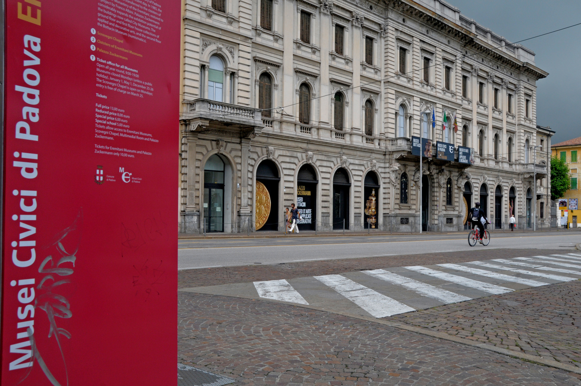 Musei civici agli Eremitani This is a photo of a monument which is part of cultural heritage of Italy.